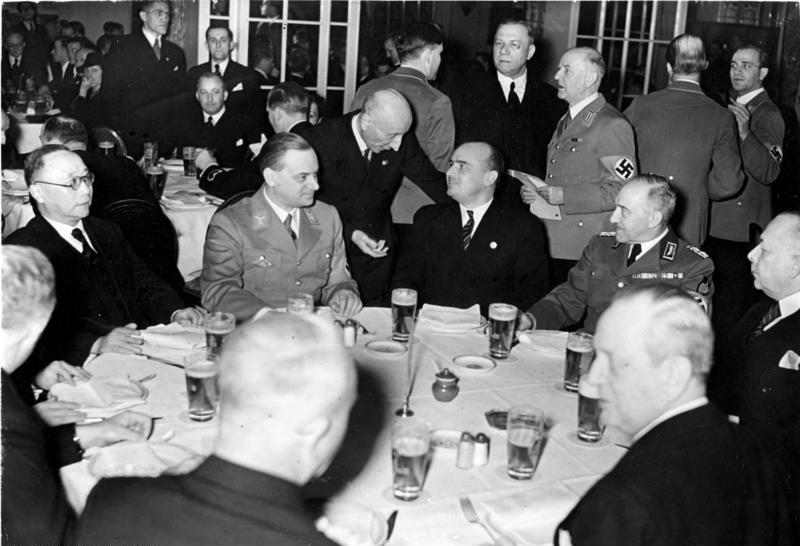 Vorschläge Rosenbergs zur Lösung der Judenfrage 8.2.1939 Der Chef des Aussenpolitischen Amts der NSDAP, Alfred Rosenberg, sprach auf einem Empfang der Diplomatie und auswärtigen Presse in Berlin über wichtige aussenpolitische Fragen der Gegenwart. In seinen Vorschlägen zur Lösung der Judenfrage betonte er, dass aus den bisherigen Projekten noch Guayana und Madagaskar zur Unterbringung der Juden übrig blieben. Auf unserem Bild sieht man von links nach rechts den chinesischen Botschafter Chen-Chih, Reichsleiter Rosenberg, Reichsminister Frank im Gespräch mit dem italienischen Professor Manacorda, weiter rechts Reichsarbeitsführer Hierl, der tschecho-slowakische Gesandte Dr. Mastny und (im Vordergrund) der dänische Gesandte Kammerherr Zahle. Bei Abdruck nennen: Scherl Bilderdienst, Berlin 8.2.39